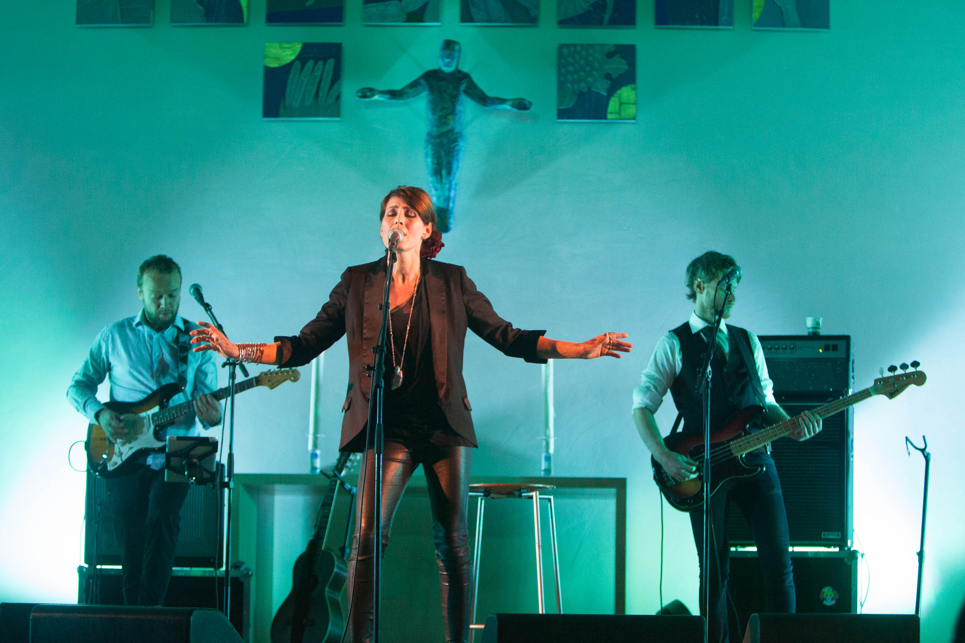 Kari Bremnes med band under en konsert i Hunstad Kirke i 20. oktober 2013